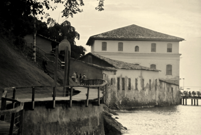 Foto do Solar do Unhão (Salvador, Bahia). Picture from the Solar do Unhão (Salvador, Bahia, Brazil). Setembro de 2003/ 2003 September Author: Bruno da Silva Lessa (user brunoslessa)